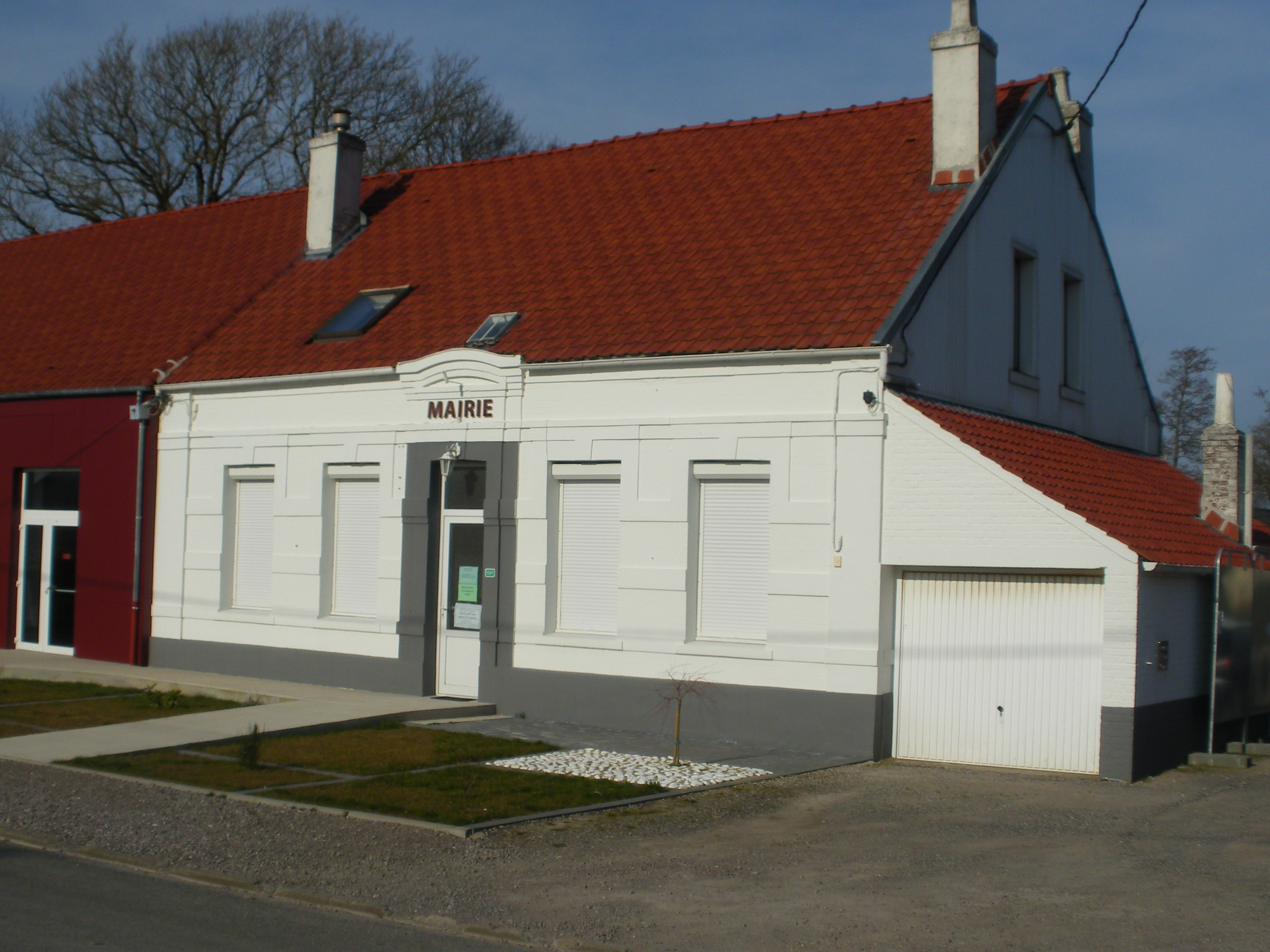 Vue de la mairie de Caffiers.